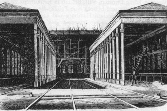 Halle des ersten Bahnhofes in Altona. Älteste erhaltene Daguerreotypie Schleswig-Holsteins (Nordelbingen Bd. 56, 1987, Uwe Steen: Anfänge der Fotografie in Schleswig-Holstein, S. 114)